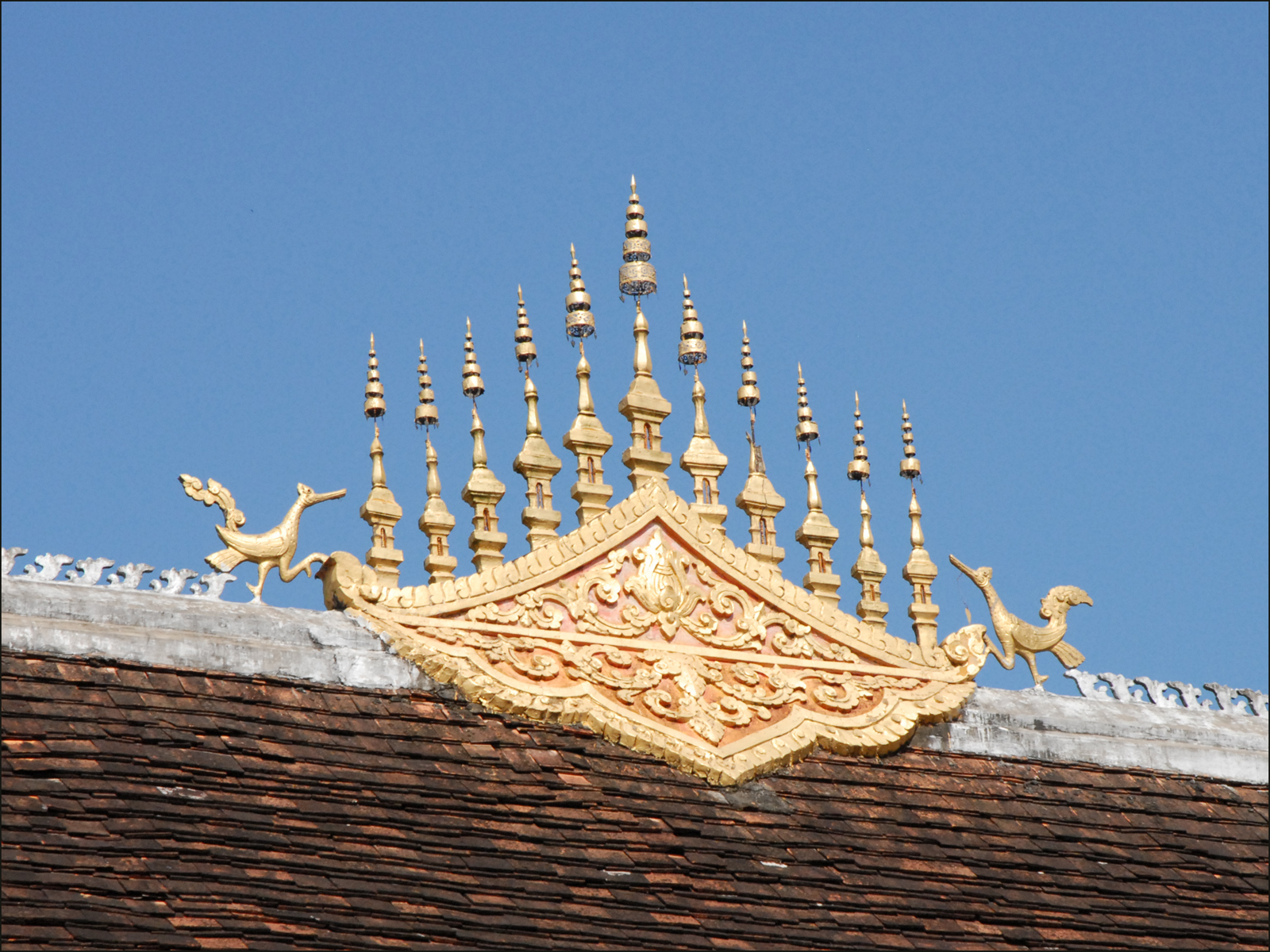 Le bouquet de fleurs de ciel (Dok so fa) sur le toit des pagodes représente le Mont Meru, axe du monde, entouré des montagnes mythiques et d'hamsas qui sont les oies montures de Brahma